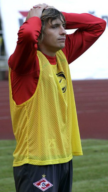 Maksym Kalynychenko